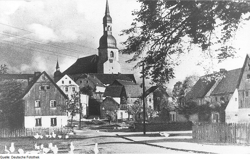 Original image description from the Deutsche FotothekCrostwitz. Ortsansicht mit Wassermühle, aus: Oberlausitzer Heimatbuch, 1950